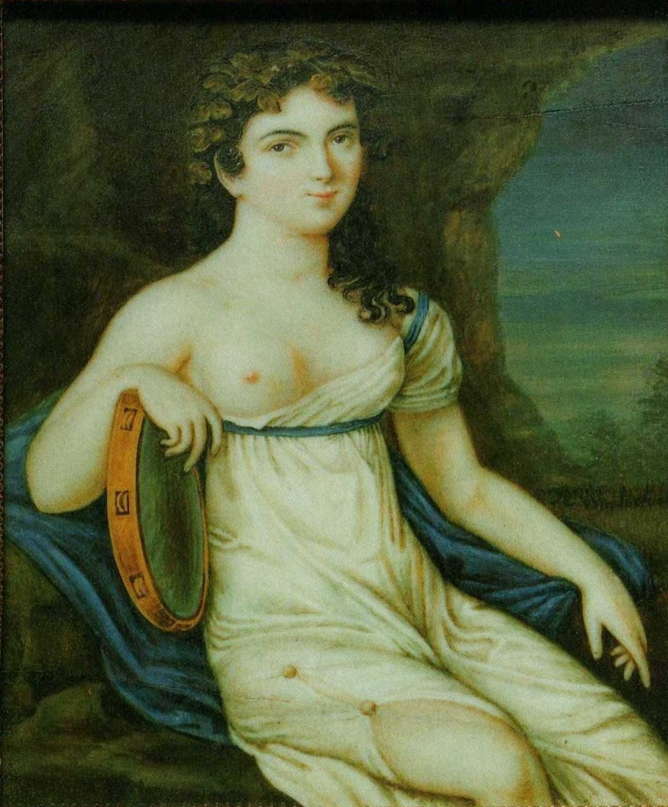 Портрет А.И. Истоминой. Музей Пушкина